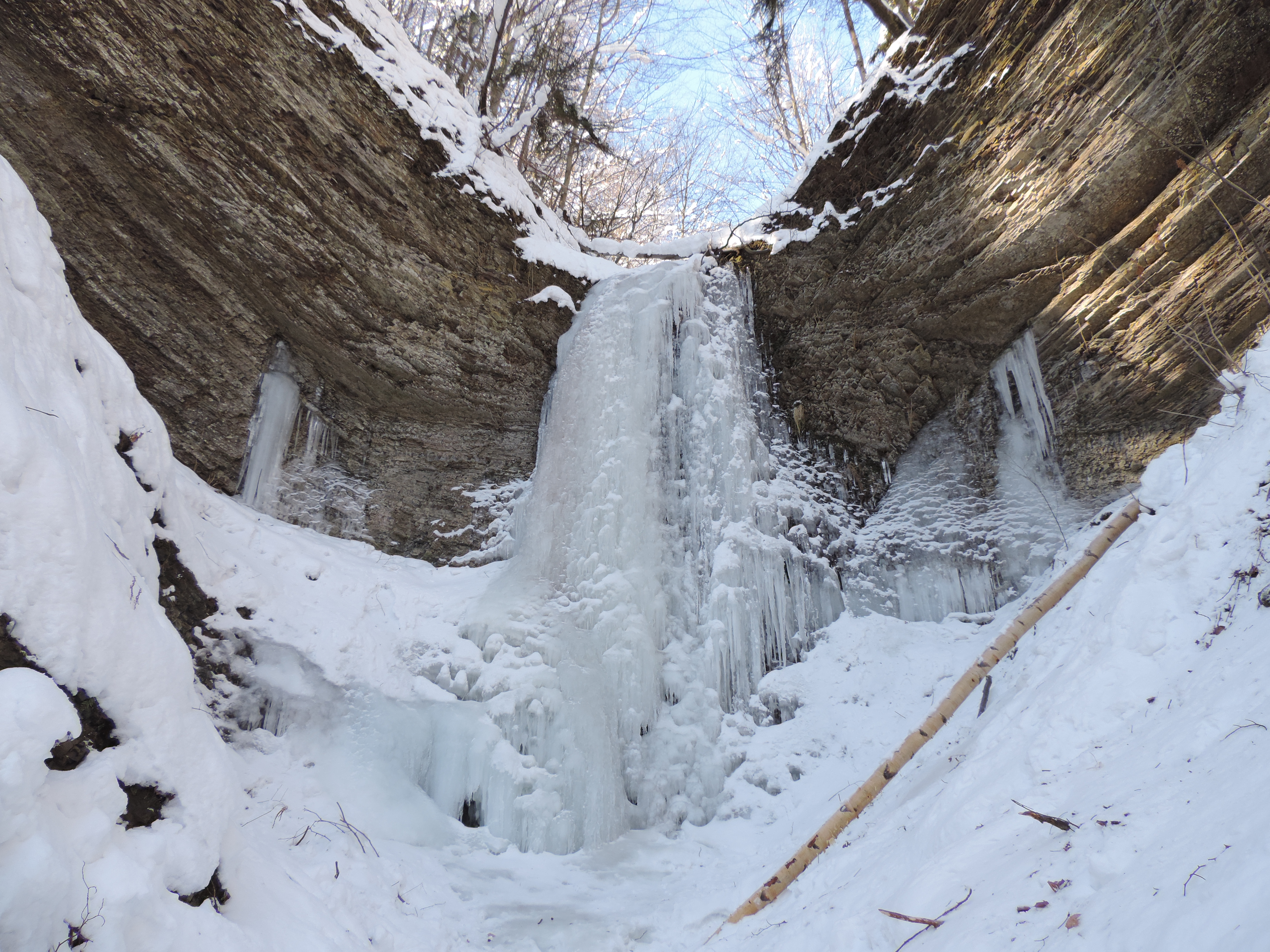 Водоспад Скрунтар узимку.